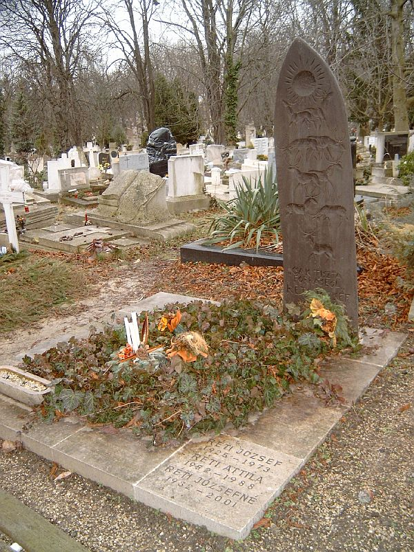 Réti József (Ploeşti, Románia, 1925. július 8. – Budapest, 1973. november 5.) operaénekes (tenor) sírja Budapesten. Farkasréti temető: 25-10-9/10 [szobrász: Szabó Iván]